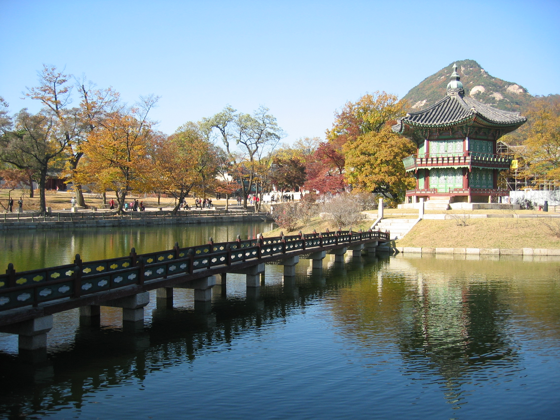 Gyeongbokgung Palace in Seoul - 경복궁